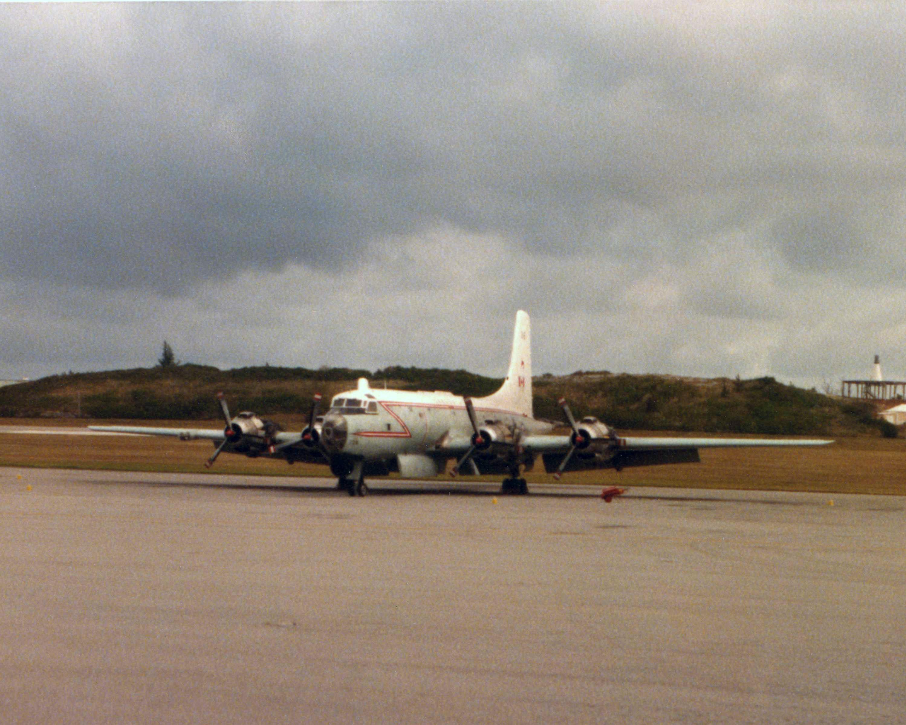 Argus in Bermuda 1979